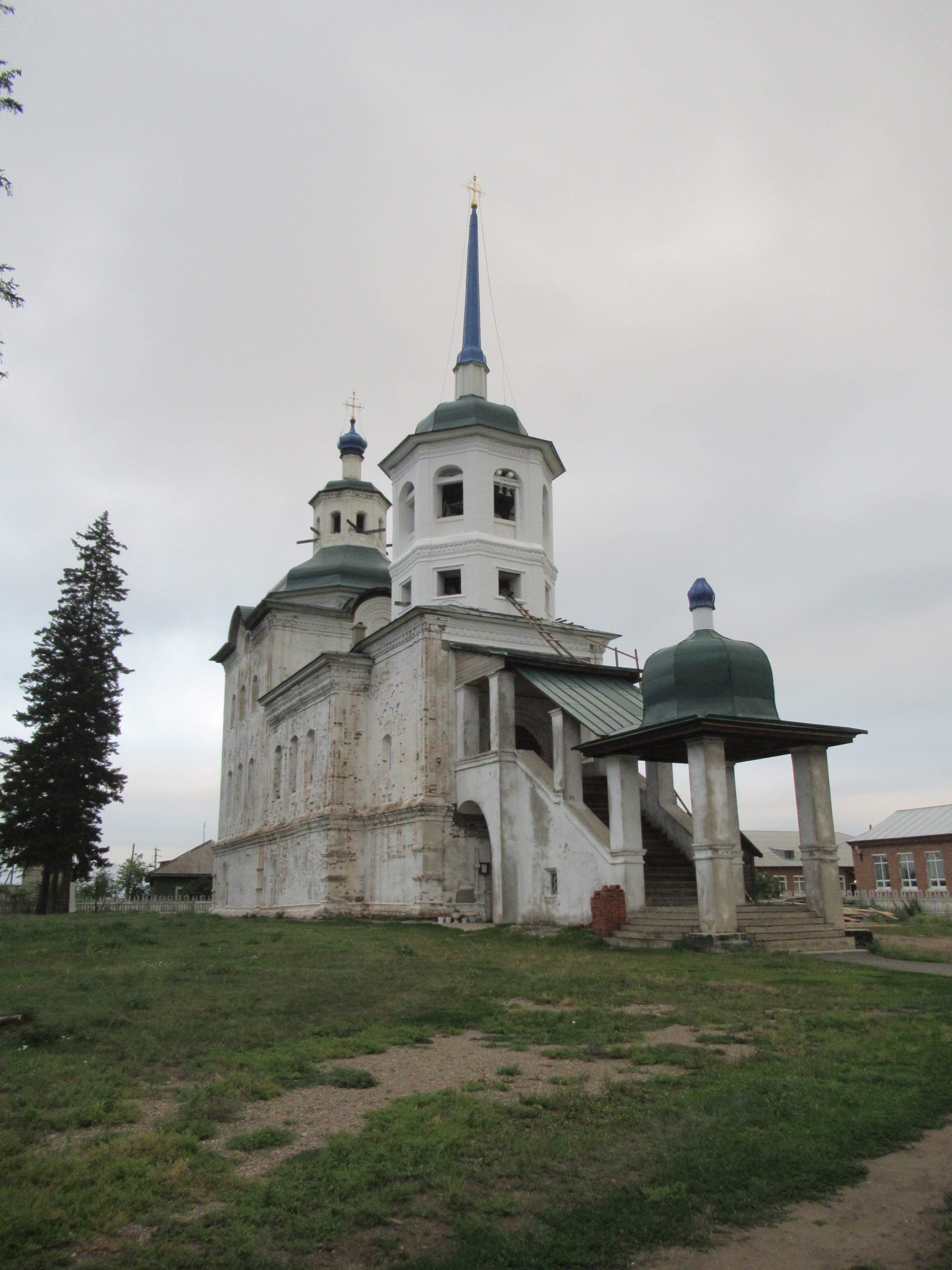 Церковь Спаса Нерукотворного Образа: улица Братьев Ченских, 2, Урик, Иркутский район, Иркутская область